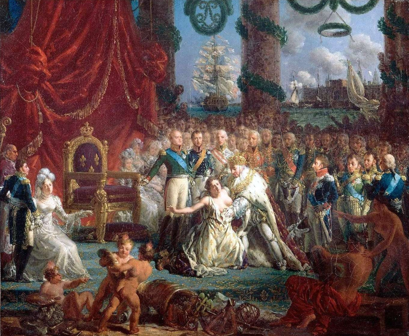 Personne représentée : Louis XVIII, Louis-Antoine d'Artois, duc d'Angoulême, Marie-Thérèse-Charlotte de France, duchesse d'Angoulême, Alexandre-Angélique de Talleyrand-Périgord, Louis V-Joseph de Bourbon, VIIIe prince de Condé, Charles X, Charles-Ferdinand d'Artois, duc de Berry, Alexandre Ier, empereur de Russie, la France